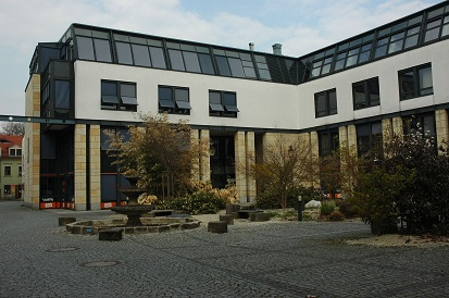 ehemalige LASuV-Zentrale in Dresden zwischen Bautzner Straße und Böhmischer Straße, genutzt bis zum LASuV-Umzug im Januar 2015